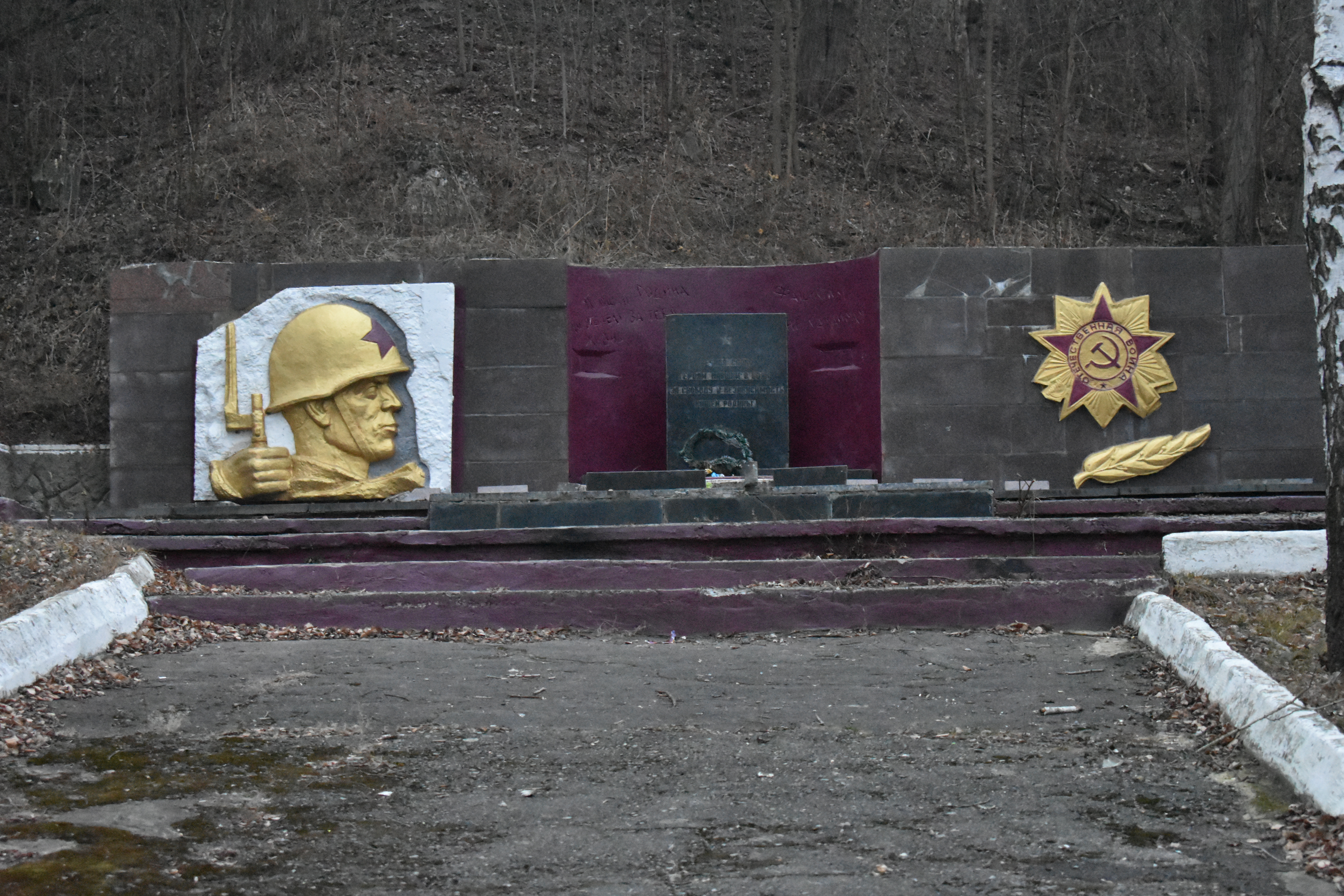 ДОТ 112 Лінія Сталіна, околиці м. Могилів-Подільський Вінницька область